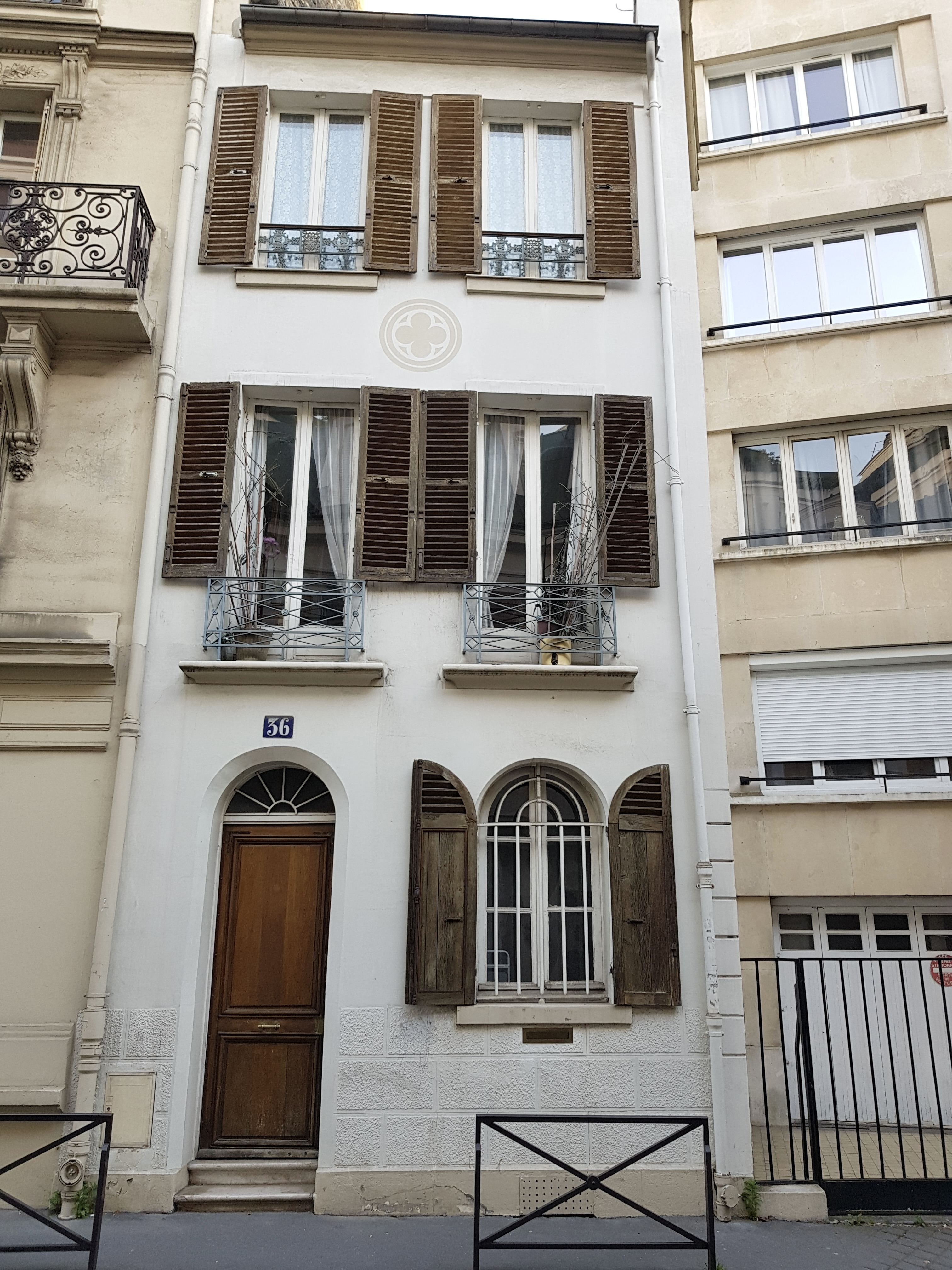 N° 36, rue Chalgrin, Paris 16e.